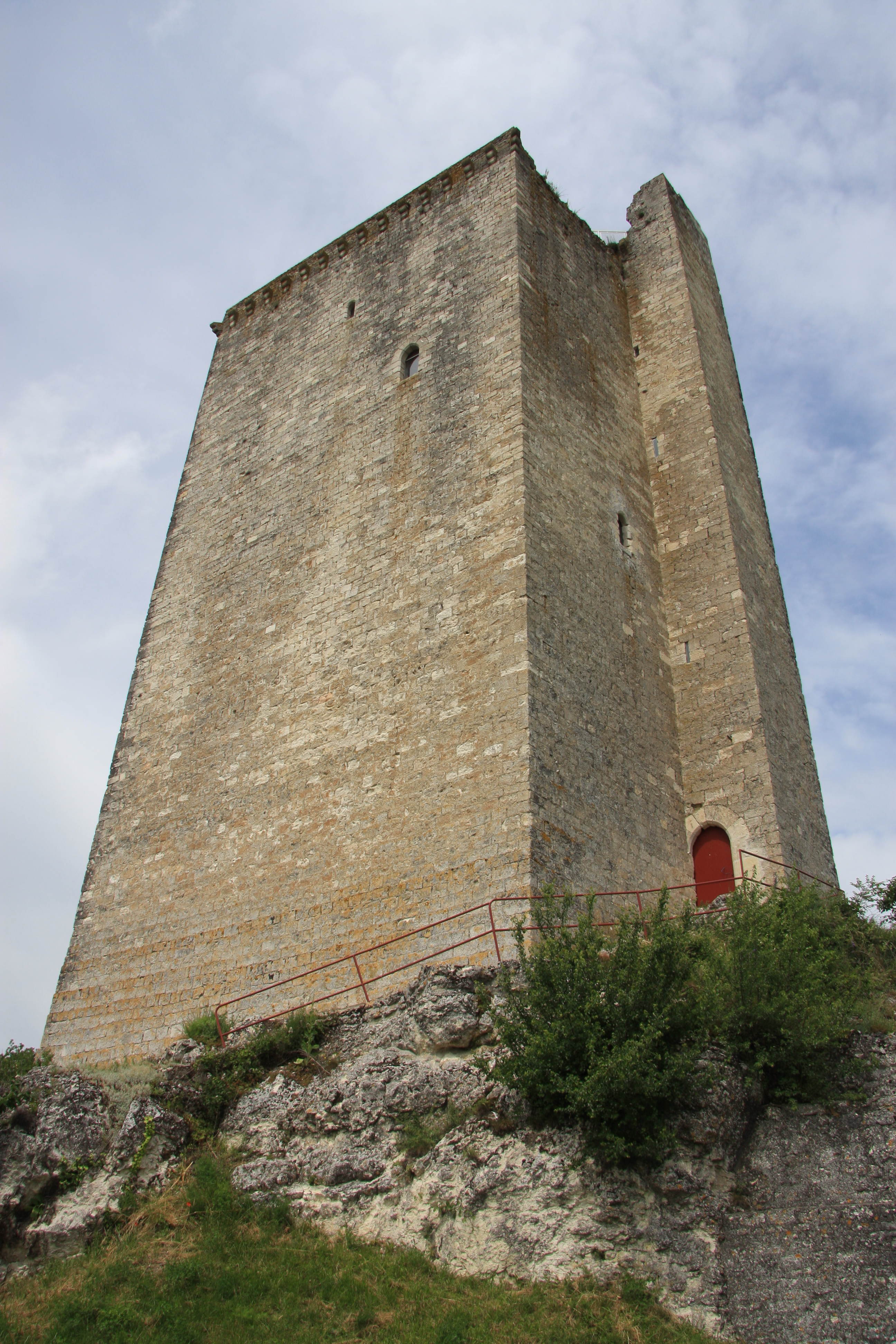 Le donjon, seul vestige du château de Montcuq